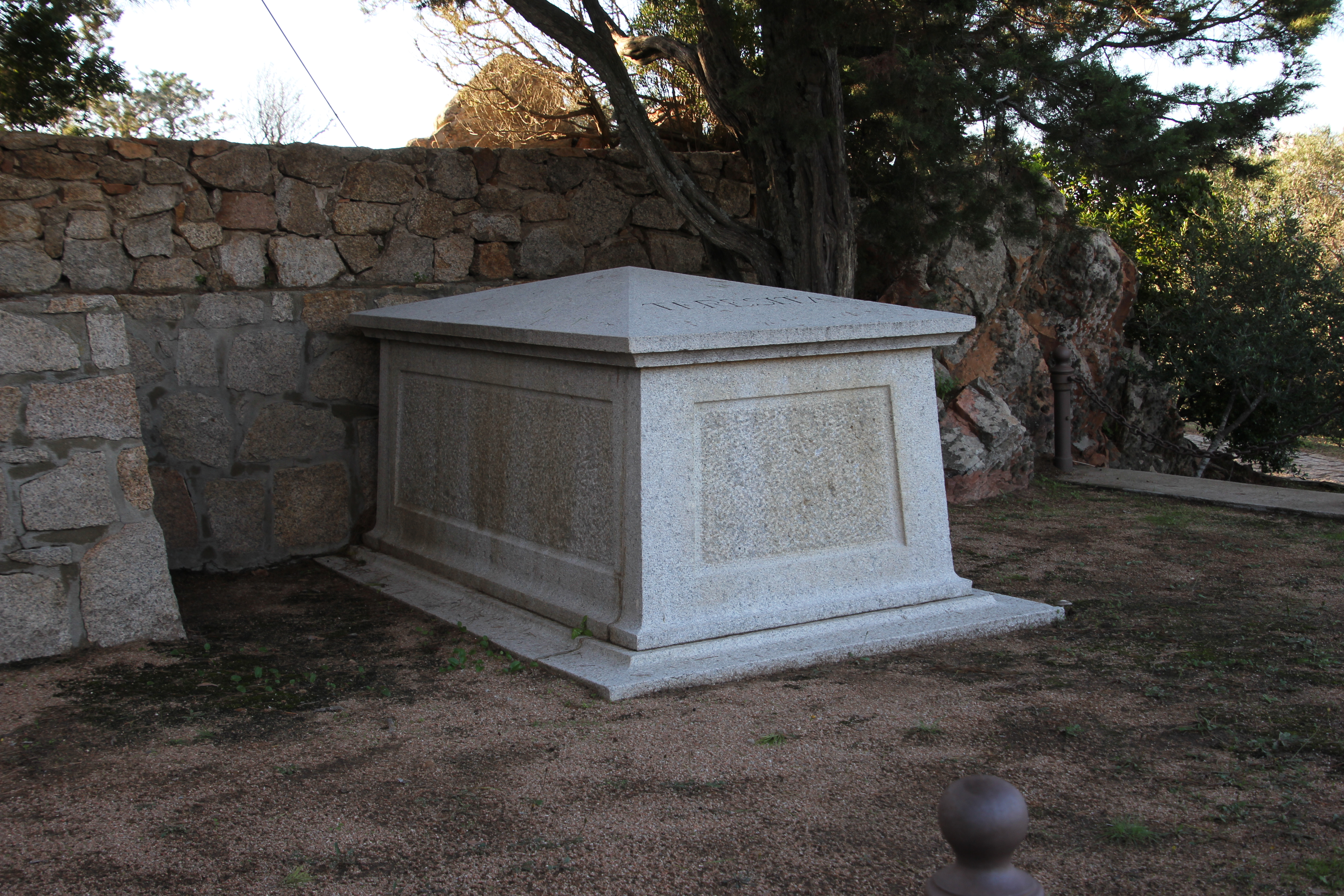 La Maddalena, compendio garibaldino di Caprera - Tomba di Teresita Garibaldi